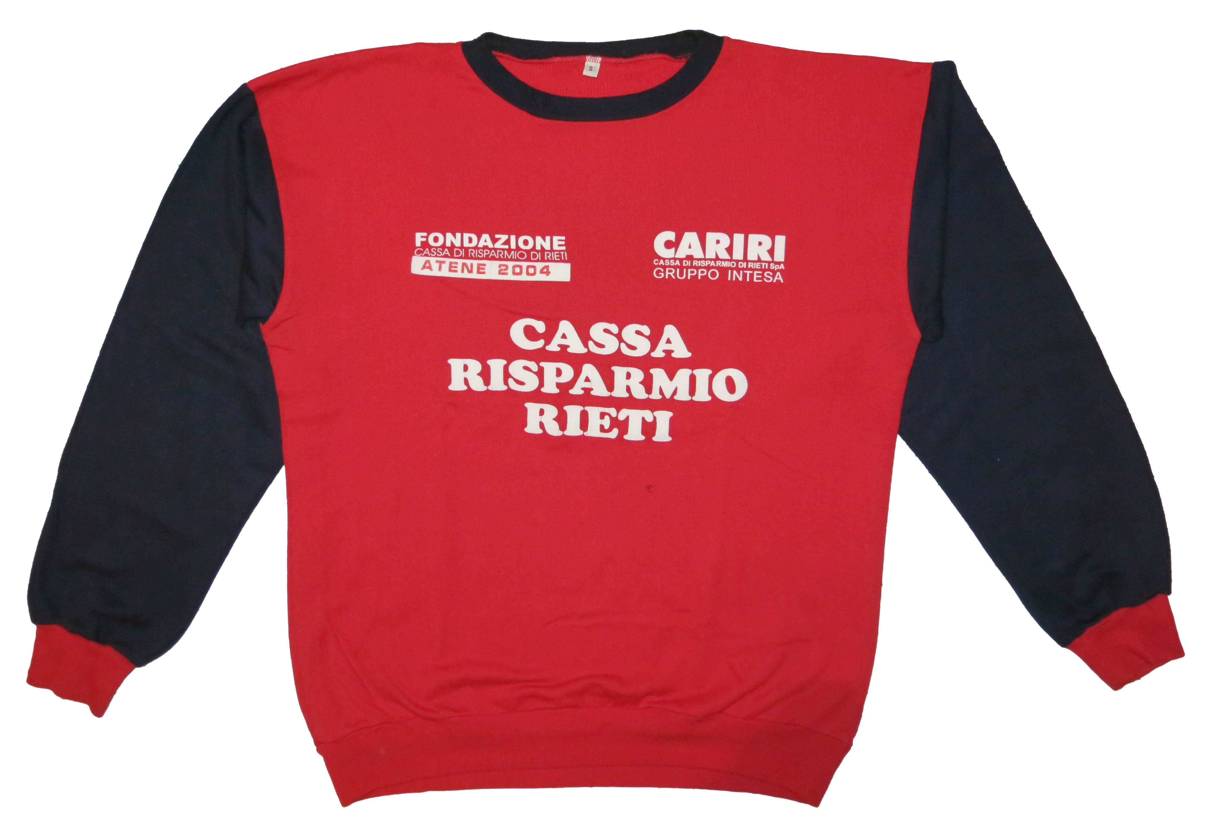 Maglia dell'uniforme da allenamento dell'Atletica studentesca CARIRI Rieti - anno 2002 circa